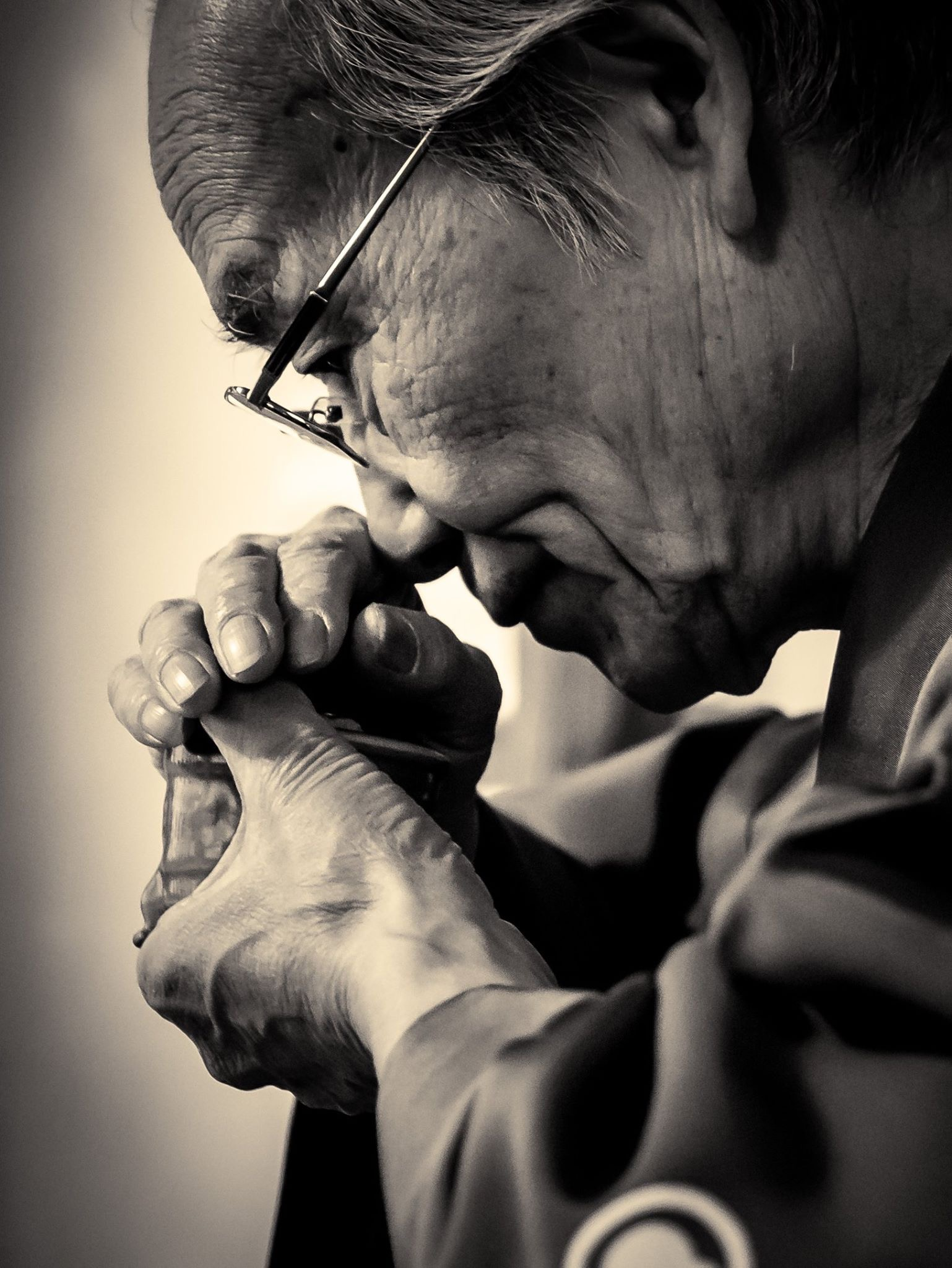 志野流香道20世家元 蜂谷宗玄